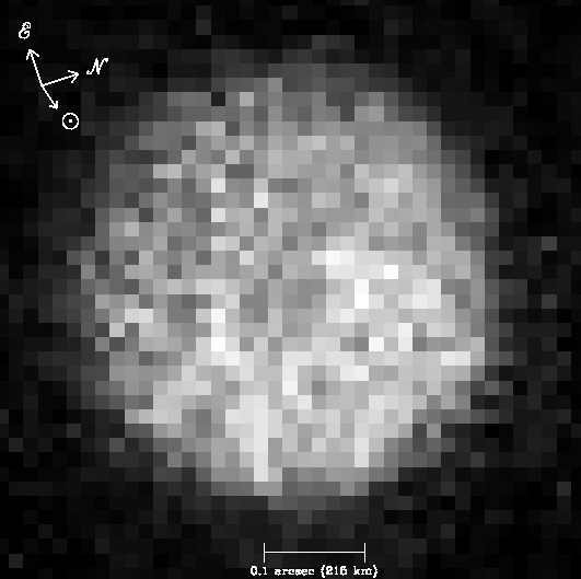 Immagine del Telescopio Spaziale Hubble dell'asteroide 1 Ceres (2001). Fonte: [1] Credit: HST / NASA / Southwest Research Institute " These images may be used by the public and the media for educational and informational purposes only. Credit to Southwest Research Institute and NASA should be given. "